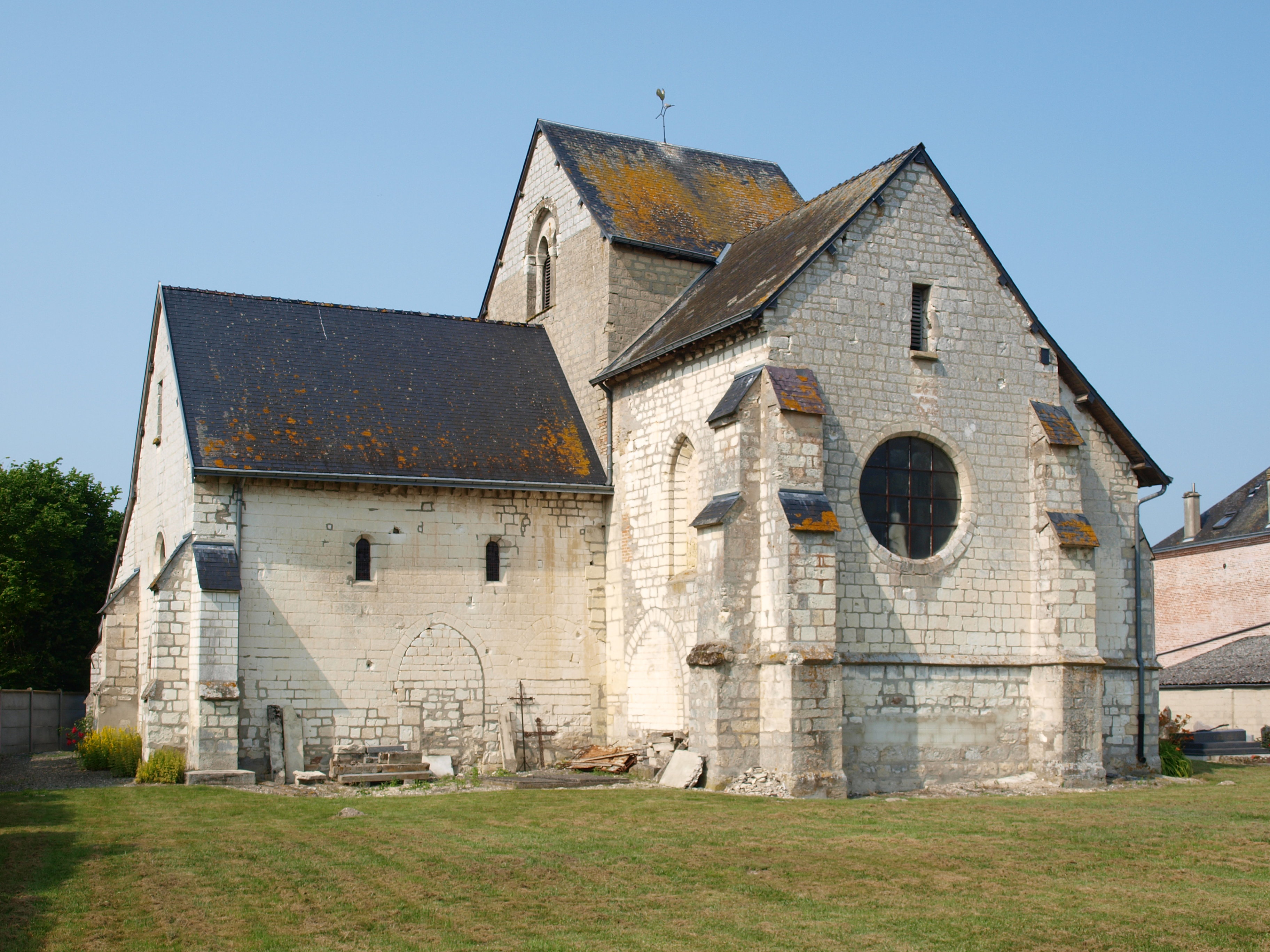 Poilcourt-Sydney (Ardennes, France) ; église